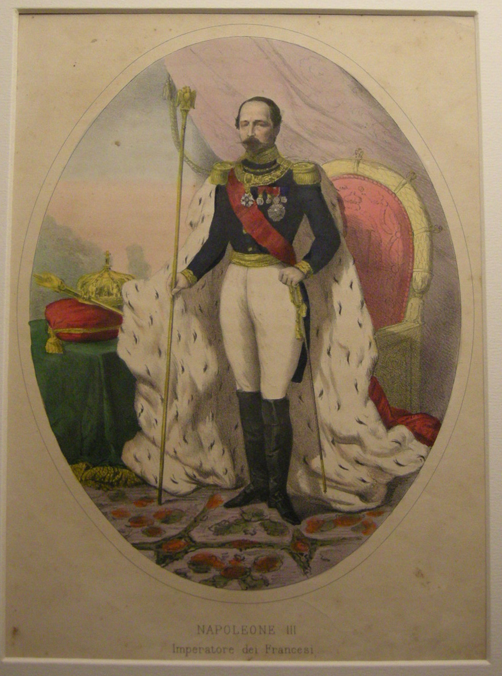 Litografia ballagny, fine XIX sec. napoleone III